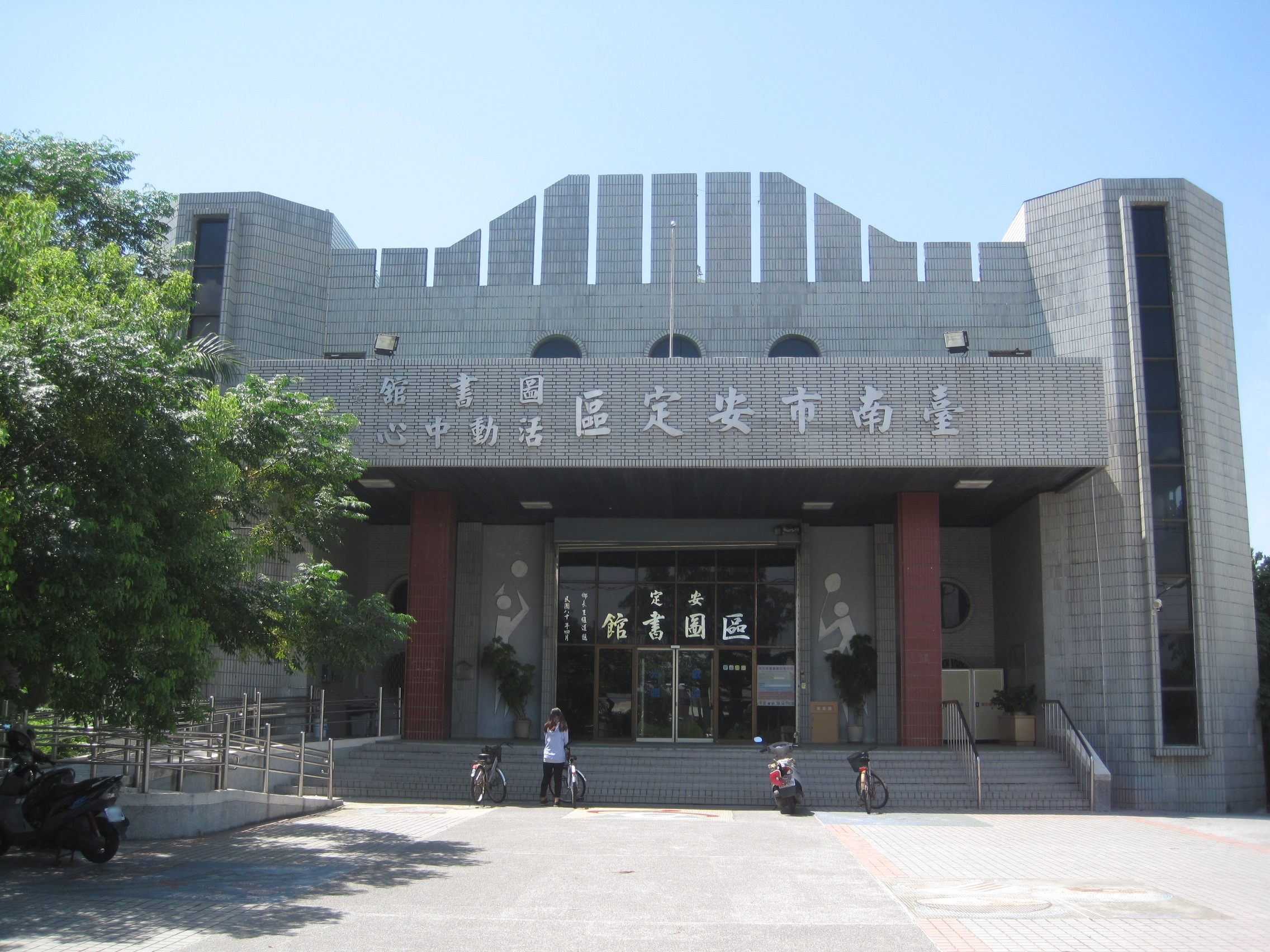 臺南市安定區圖書館